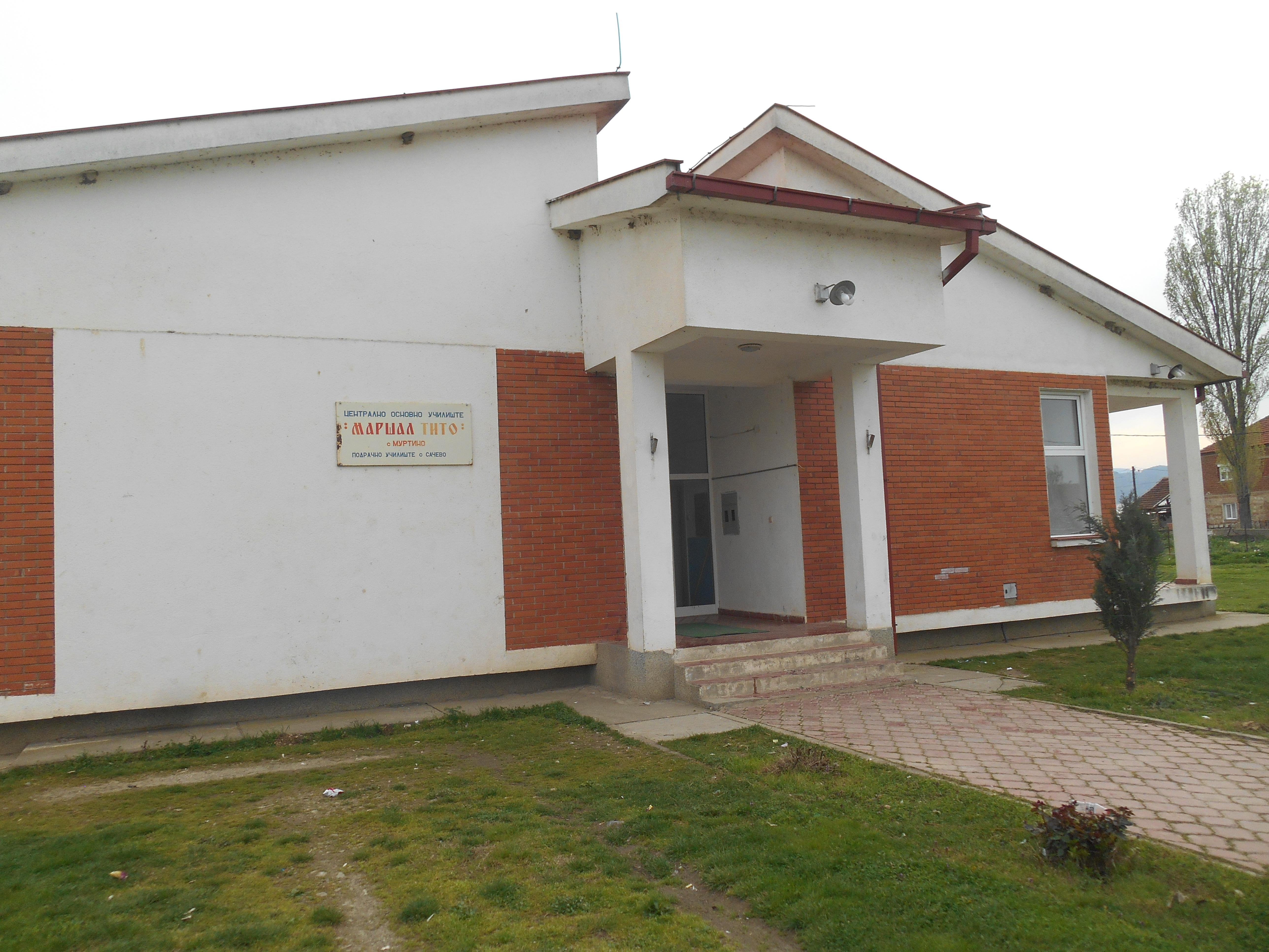 Училиште Маршал Тито - Сачево